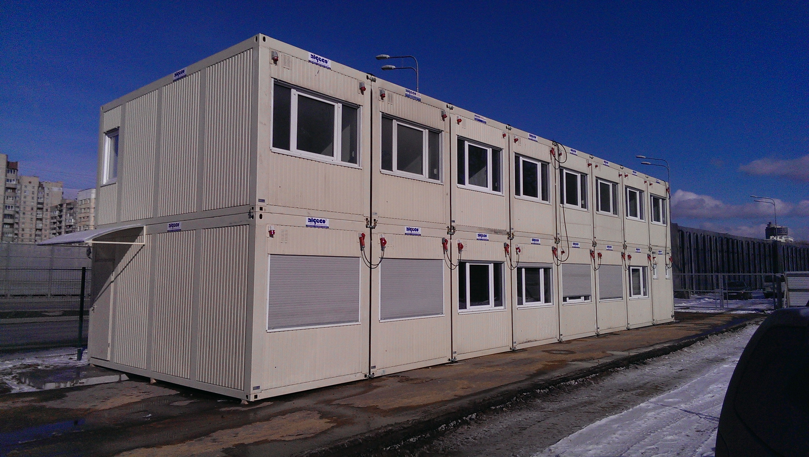 Модульное здание